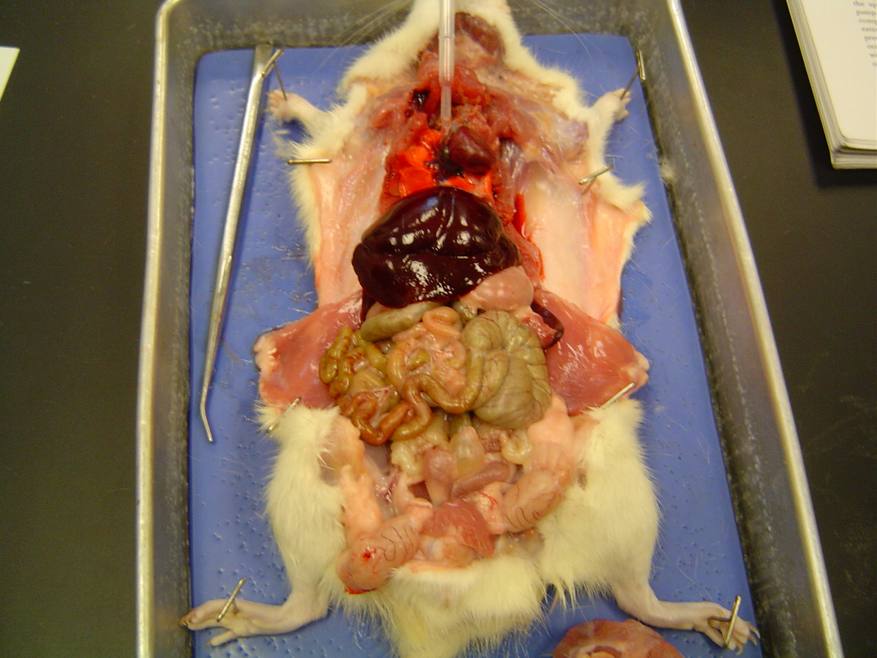 Cut up ratCut rat